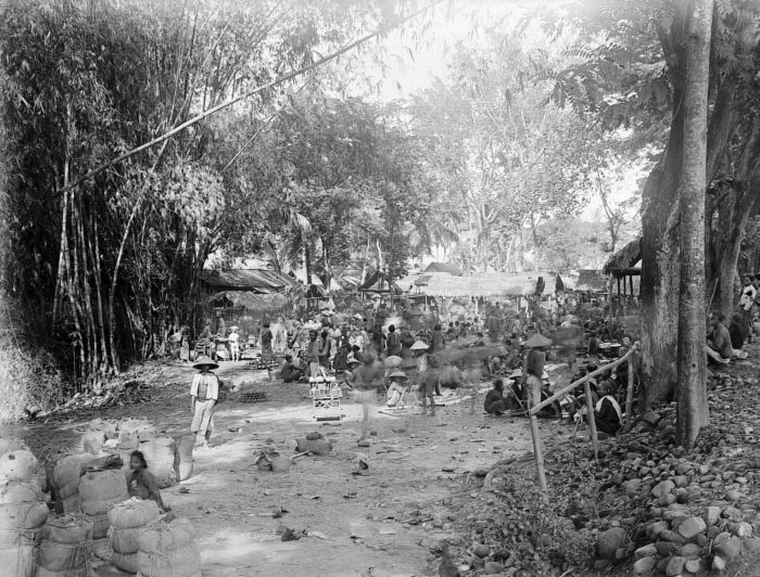 Negatief. Markt te Delangu, Klaten, Java